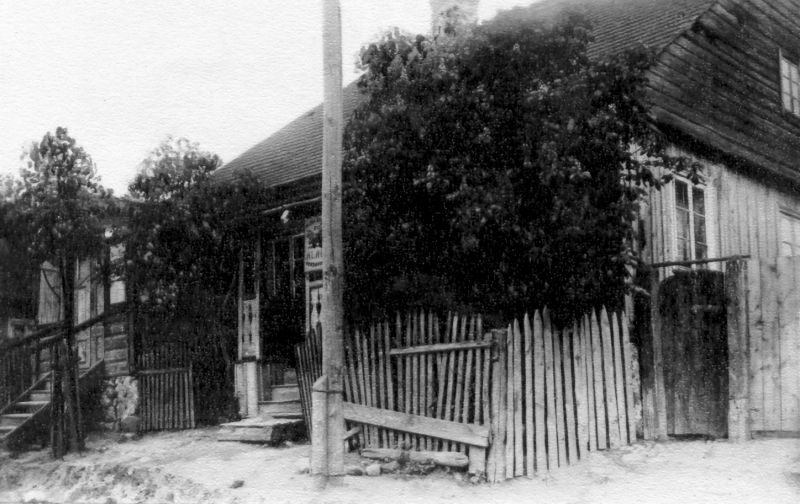 Domo de la familio Pikower en Veisiejai, en kiu LLZ loĝis ĉe sia fratino Fani en la jaroj 1885-1887.